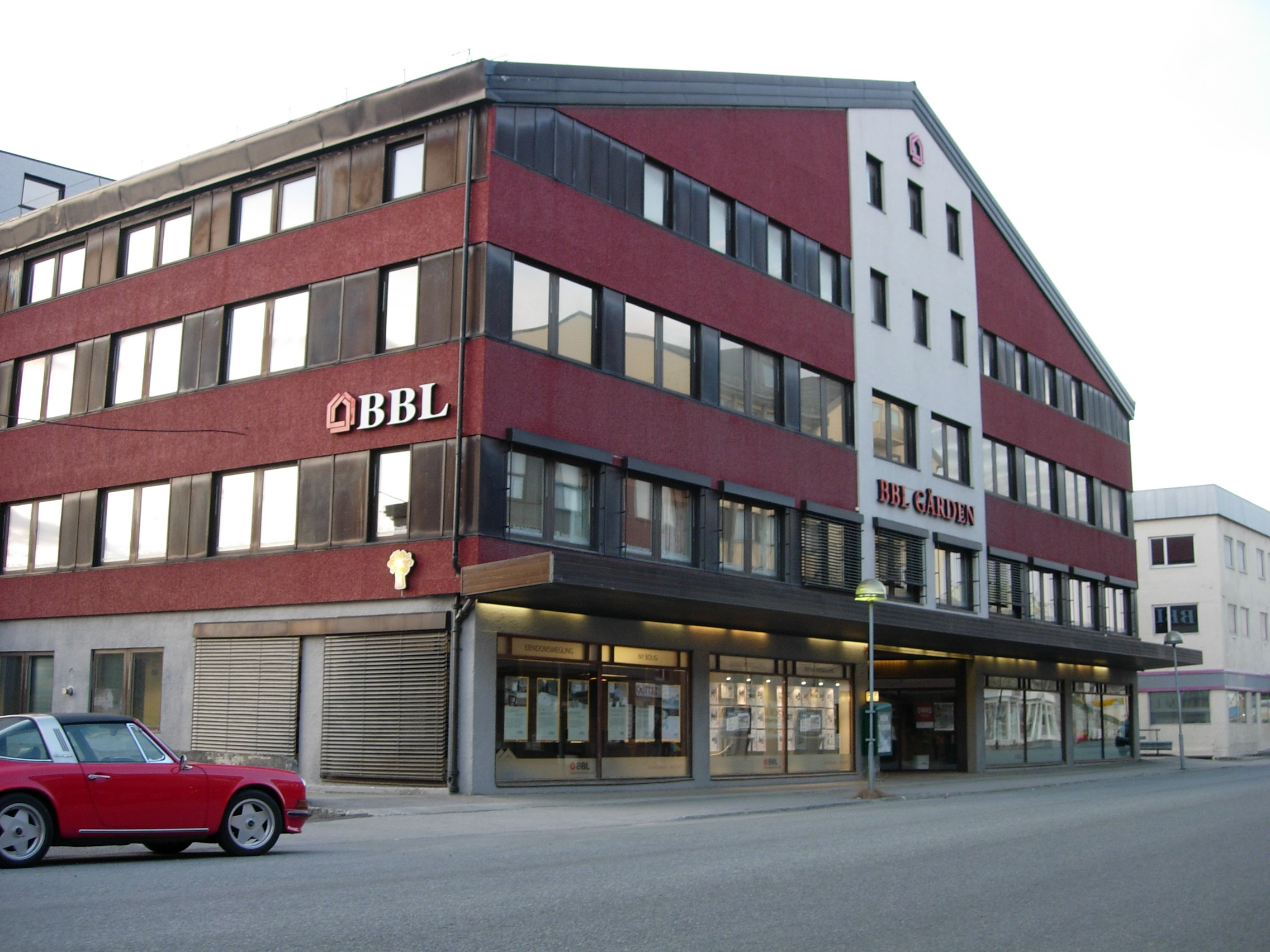 Bodø Boligbyggelags hovedkontor i Bodø